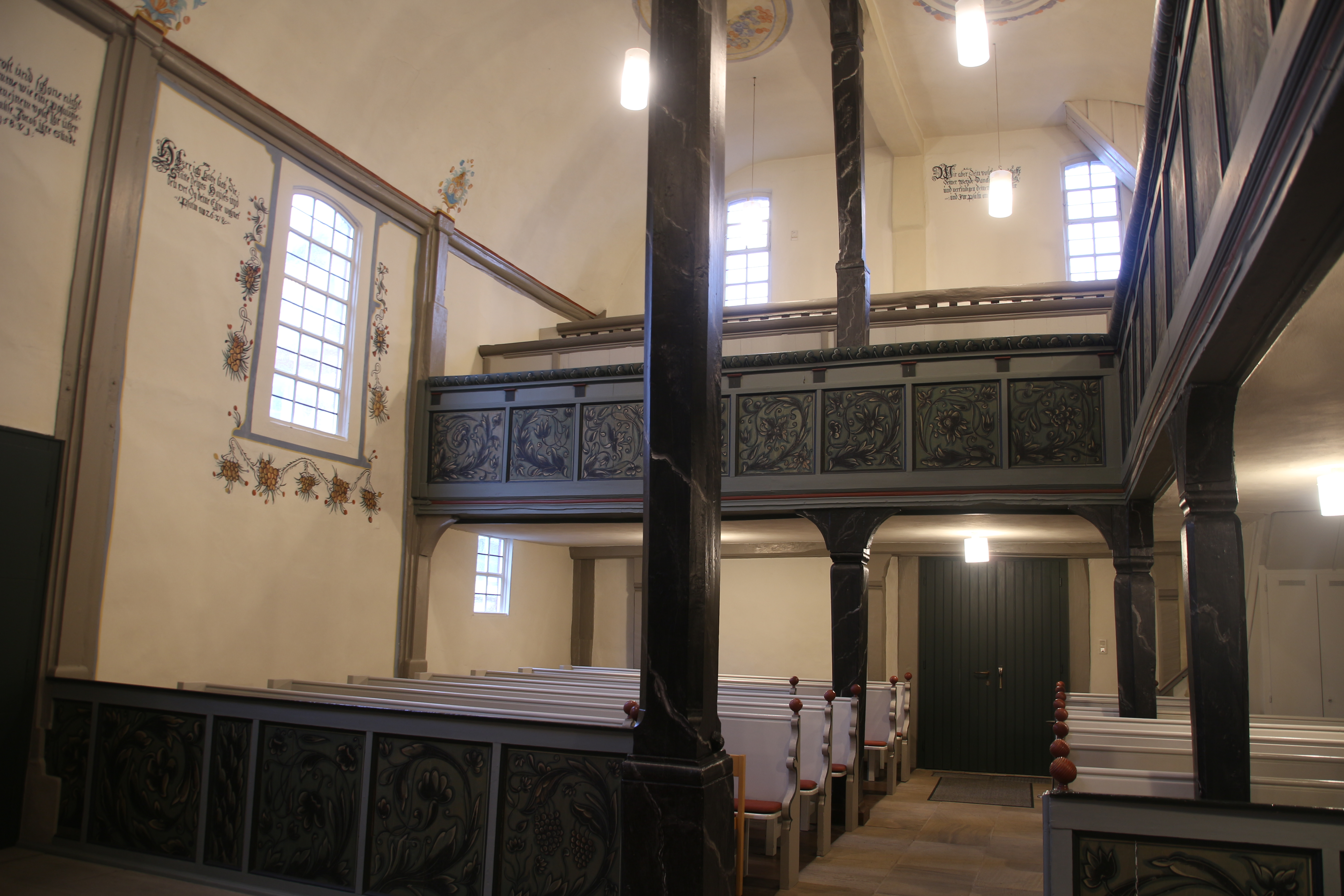 Evangelische Kirche Ruppertenrod, Vogelsbergkreis, Hessen